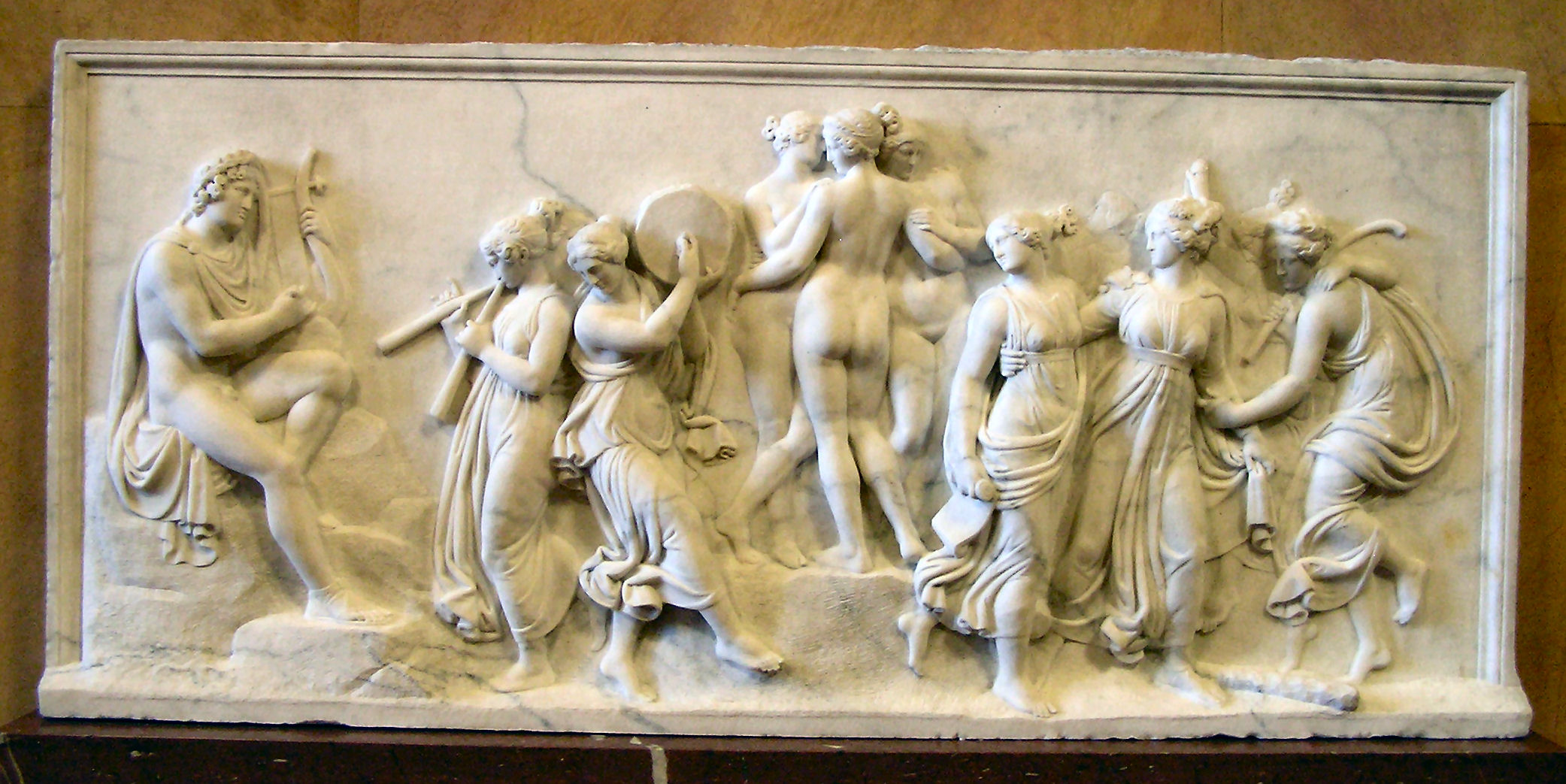 Bertel Thorvaldsen: Musernes dans, Alte Nationalgalerie, Berlin